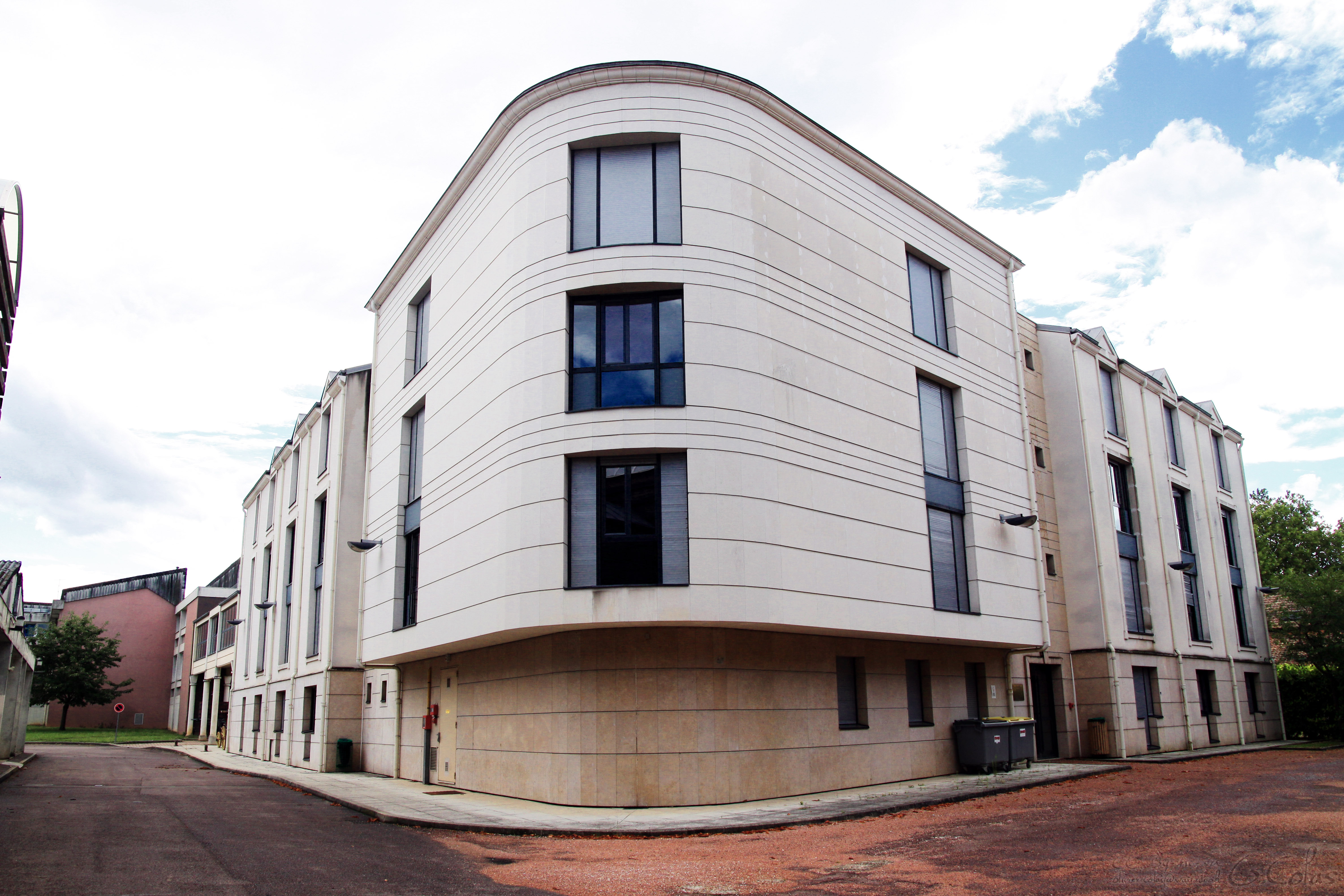 Bâtiment du nouvel internat de la Viti